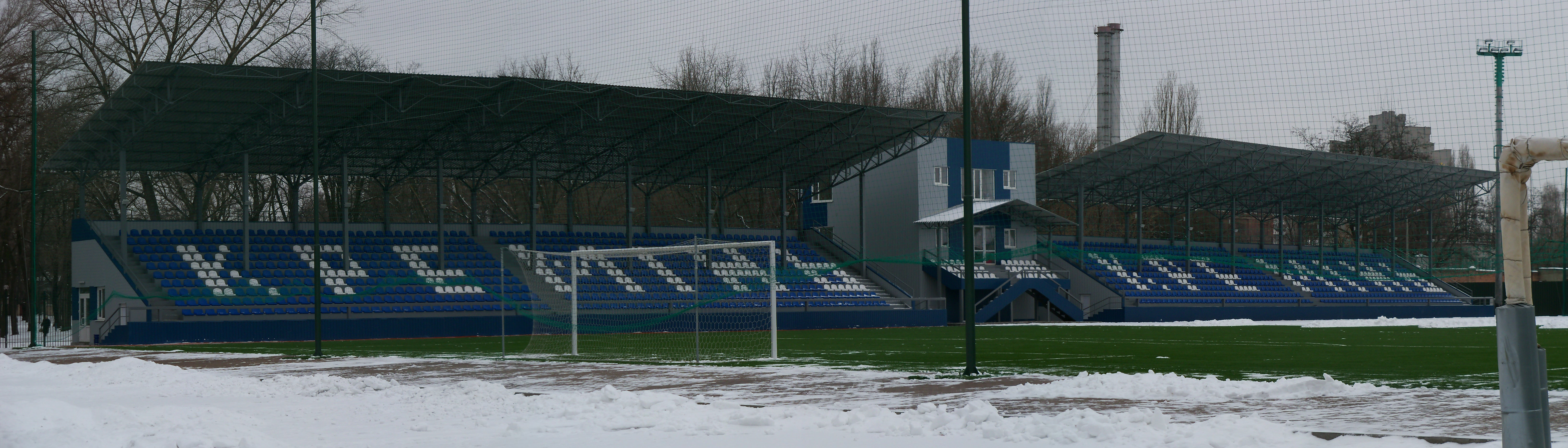 Стадіон «Кремінь» у Кременчуці